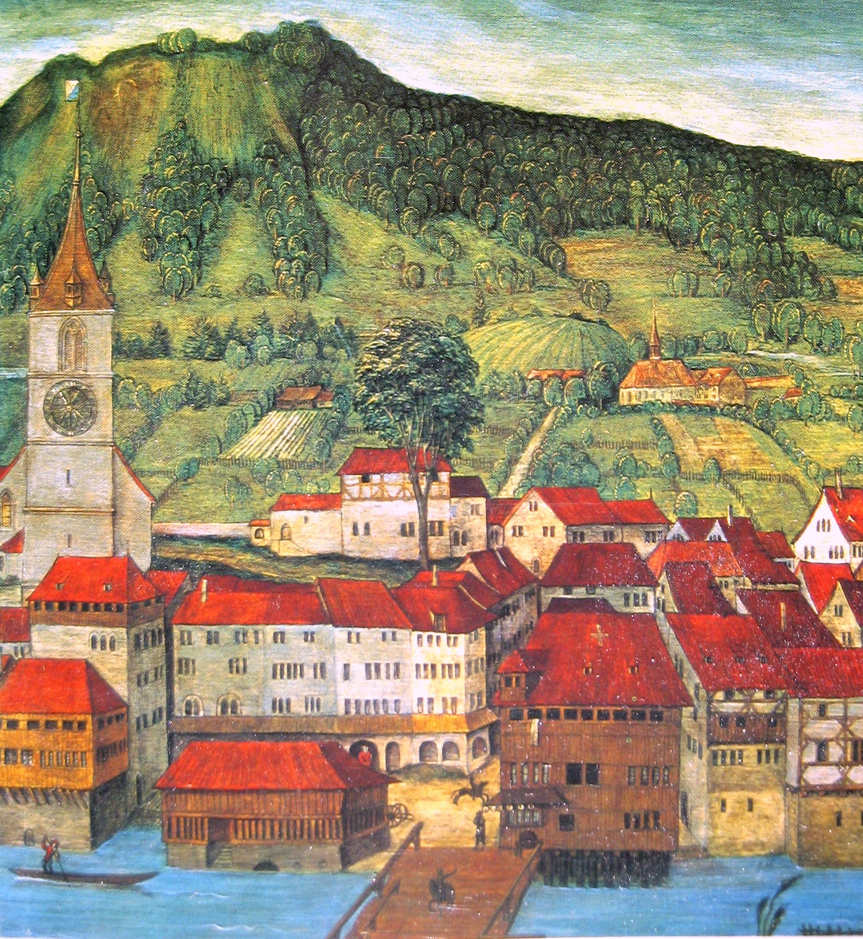 Der Uetliberg auf einem Flügel des Hochaltars von Hans Leu dem Älteren, 15. Jahrhundert. Im Vordergrund an der Limmat der Weinplatz, rechts dunkel das «Haus zum Schwert»